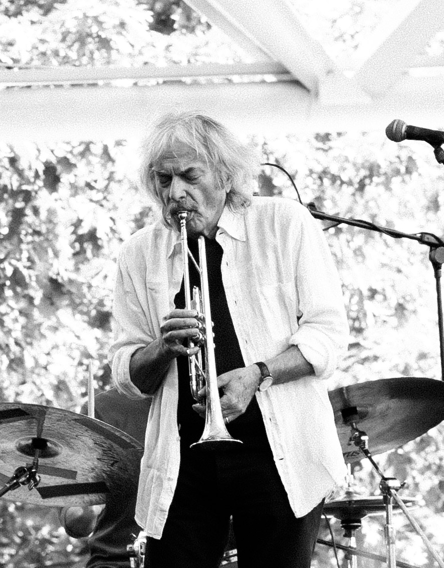 Enrico Rava en concert au Parc Floral de Paris (Vincennes); Quintet "Tribe" : Enrico Rava : trompette / Gianluca Petrella : trombone / Giovanni Guidi : piano / Gabriele Evangelista : contrebasse / Fabrizio Sferra : batterie